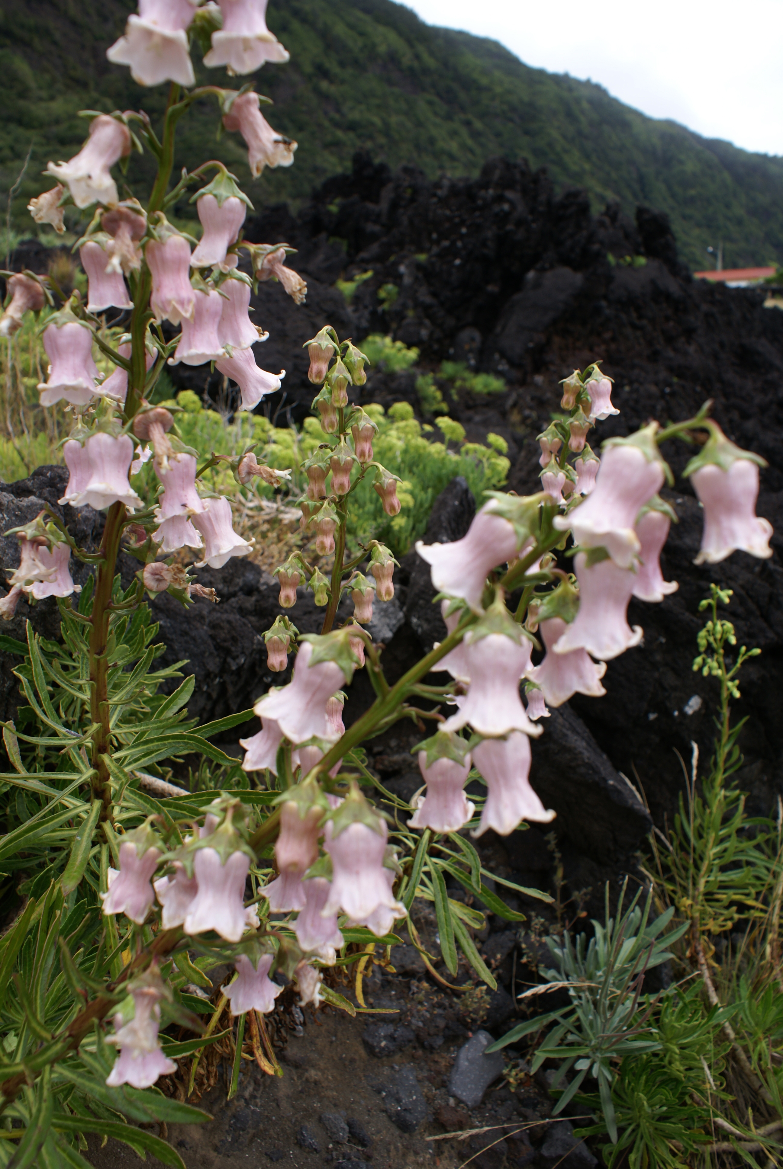 Fajã das Almas, Azorina vidalii, Manadas, Velas, Ilha de São Jorge, Açores